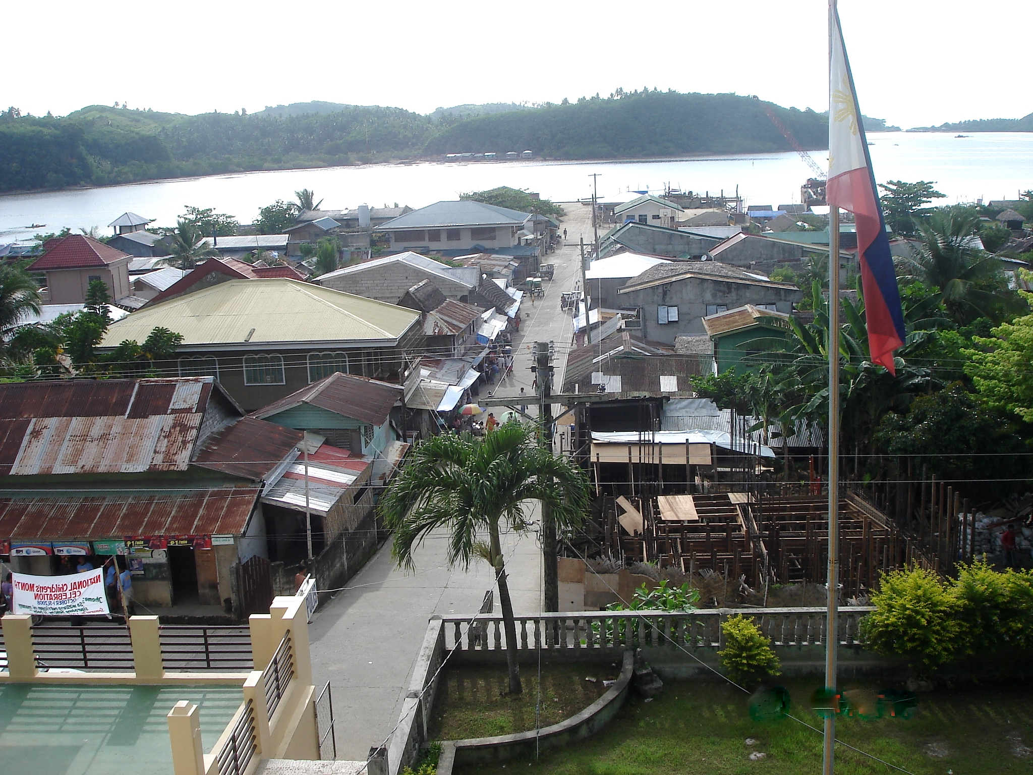 San Pascual, Masbate Province, Philippines